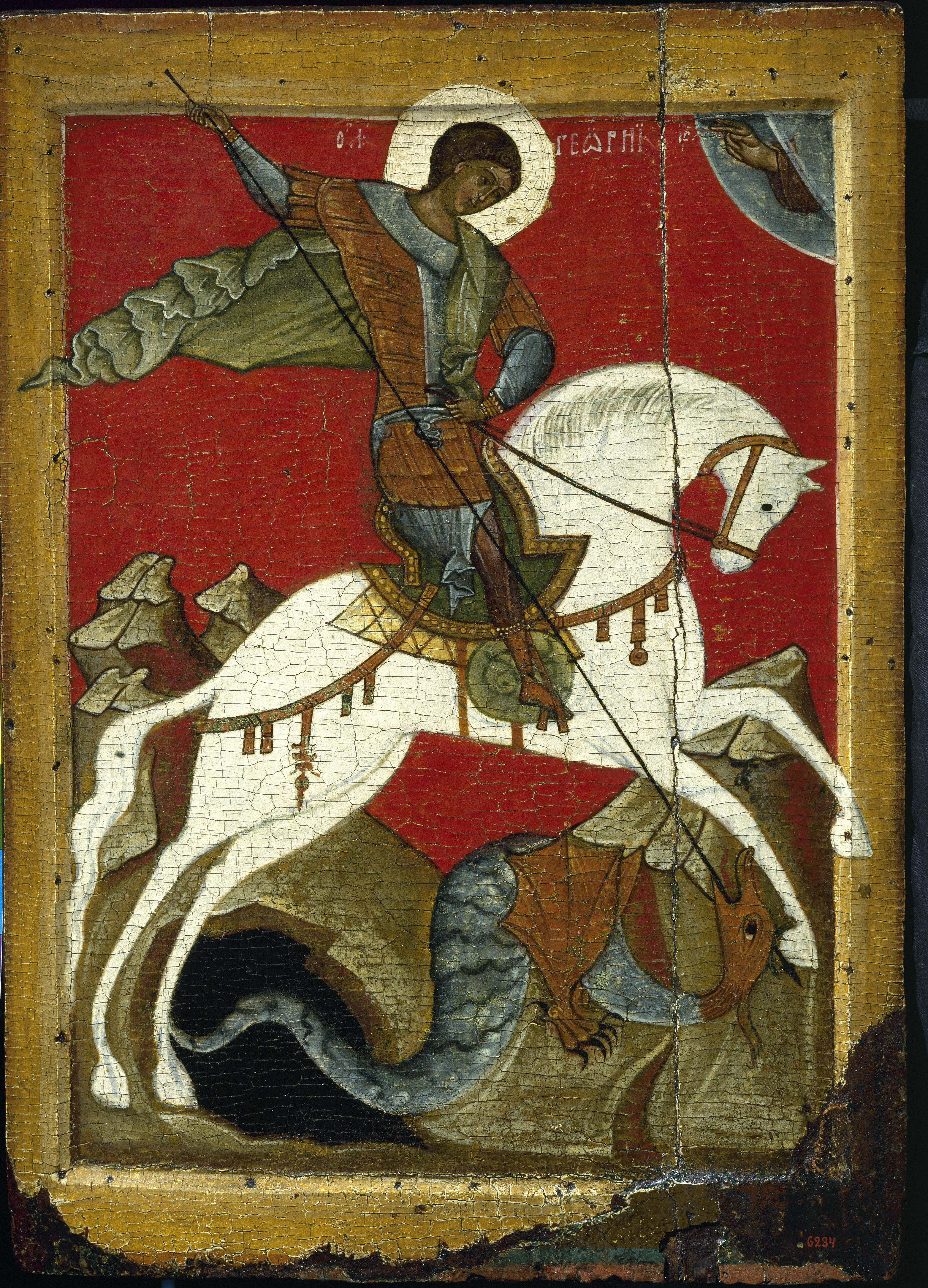 Чудо Георгия о змие.Изображён Георгий Победоносец, поражающий змея копьём.